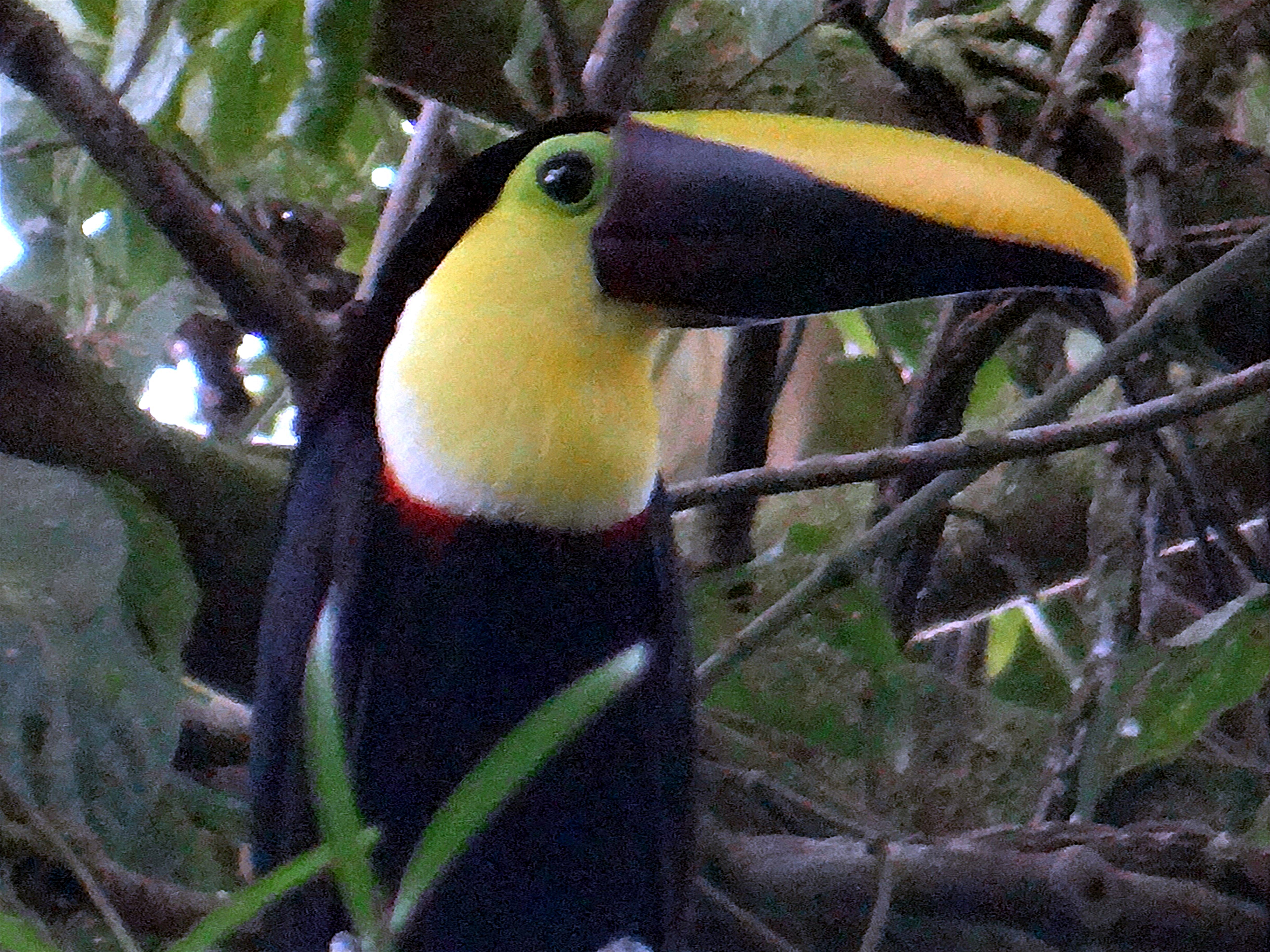 Toucan (Ramphastos ambiguus), Volcan Arenal, Sendero Las Coladas, Costa Rica.